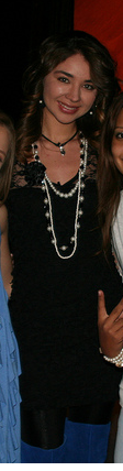 Daniela Luján